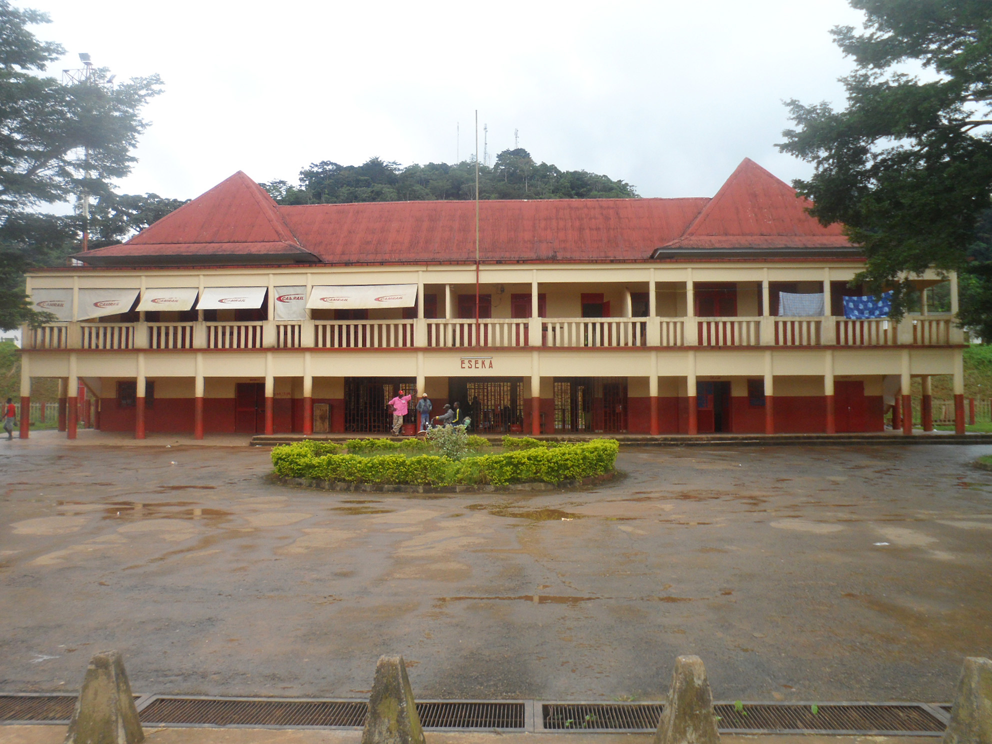 Gare d'Éséka (Cameroun).